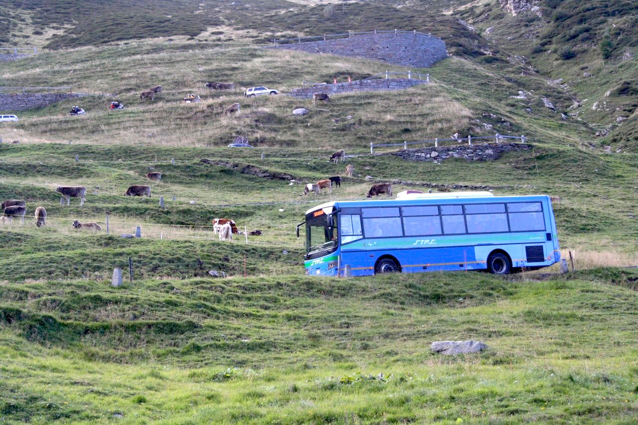 Bus der italienischen Gesellschaft Società Trasporti Pubblici di Sondrio auf der Nordseite des Splügenpasses